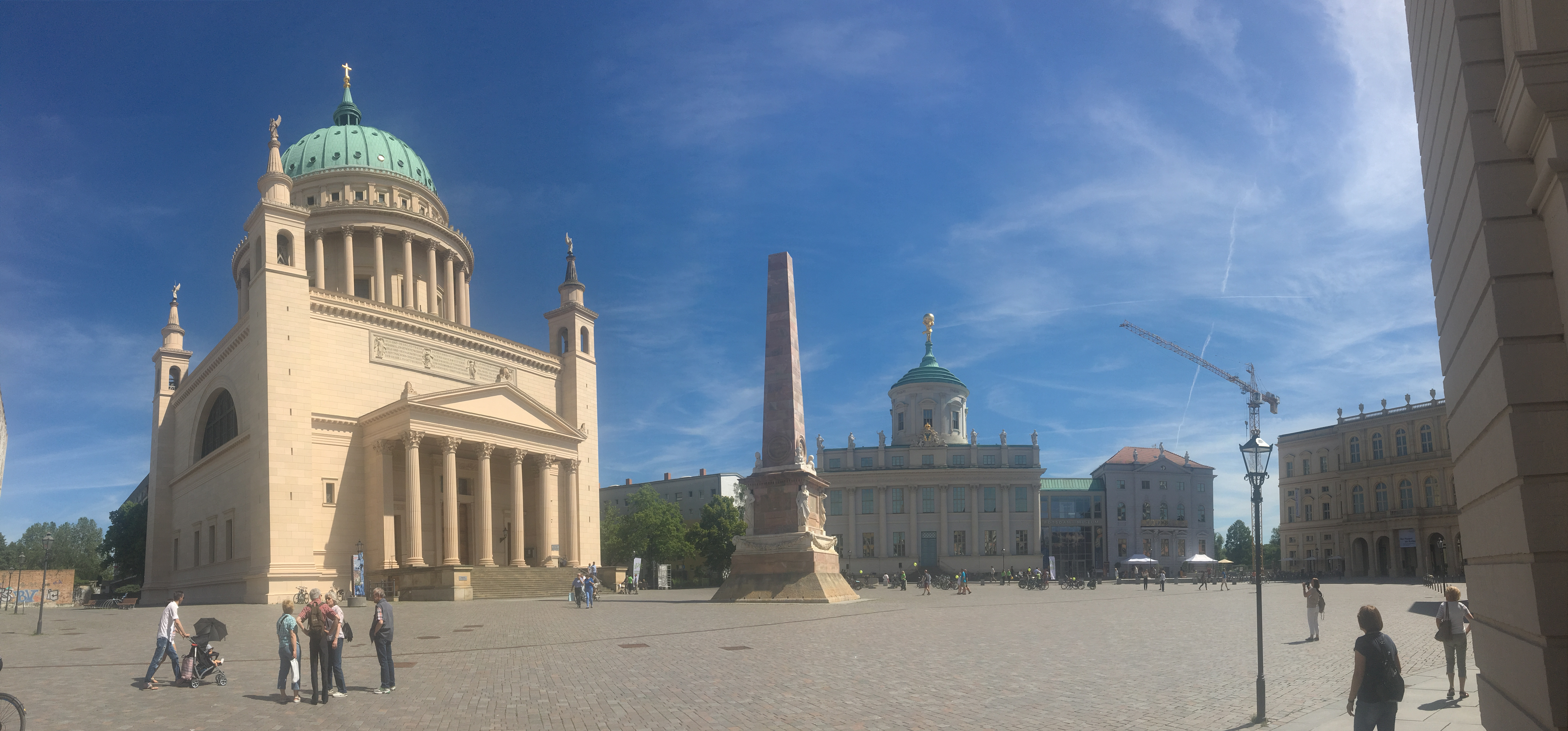 Panoramablick auf den Alten Markt in Potsdam mit St. Nikolaikirche, Marmorobelisk, Altem Rathaus und Palais Barberini (von links)